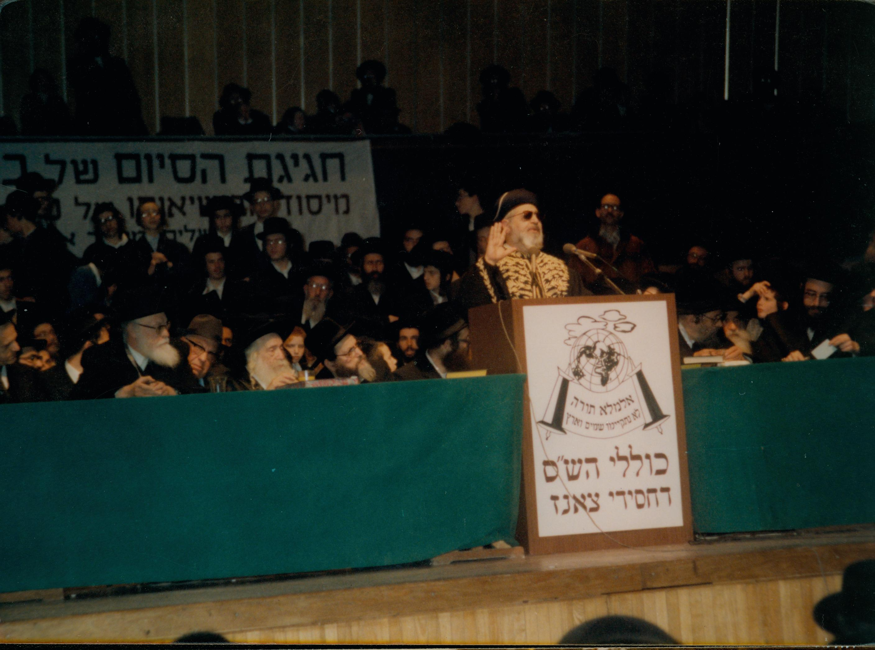 הגר עובדיה יוסף נואם באירוע ההכרזה של מפעל השס (נראה בשמאל הבמה הגריש אלישיב), טבת ה'תשמ"ג